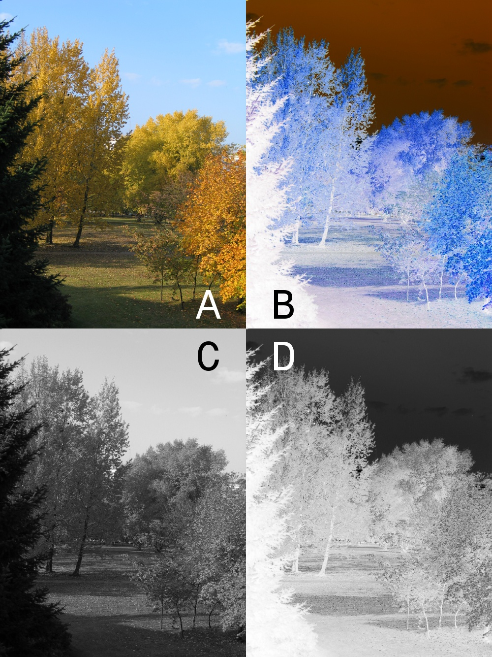 Pozytyw i negatyw zdjęcia w kolorze i odcieniach szarości.